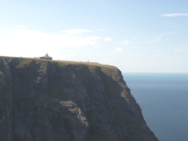 eigen foto